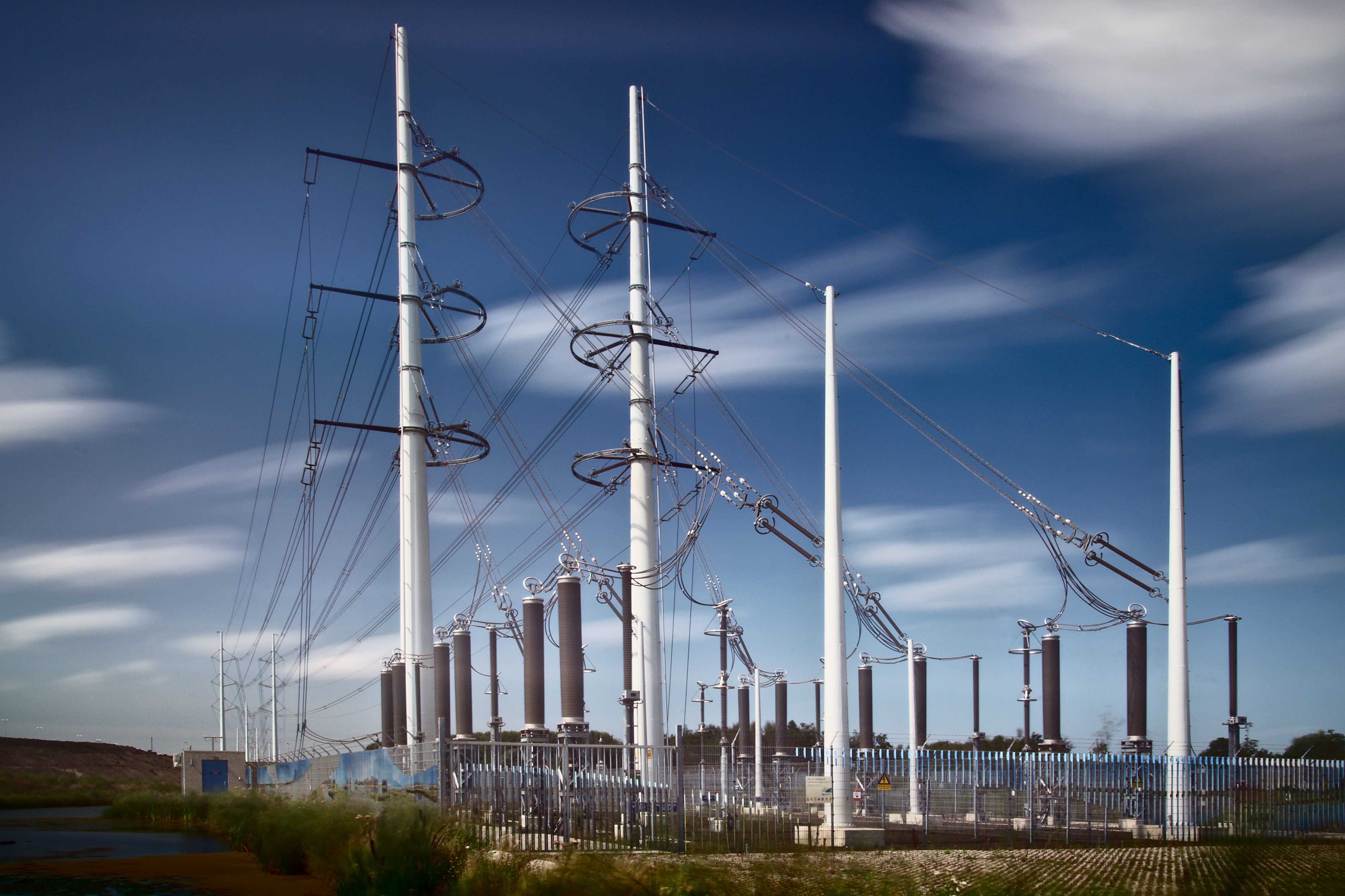 380/150-kV-Kabelübergabestation (Randstad 380 kV Zuidring Wateringen–Zoetermeer, Wintrack-Maste) im Tanthofpark in Delft, Niederlande